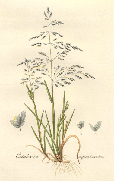 Species:Catabrosa aquatica (L.) Beauv.